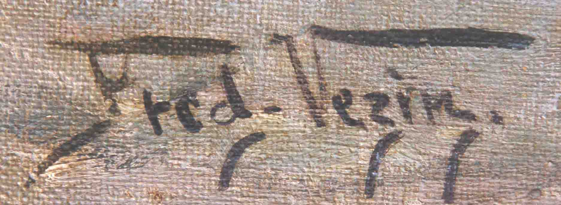 Signatur des Malers Frederick Vezin